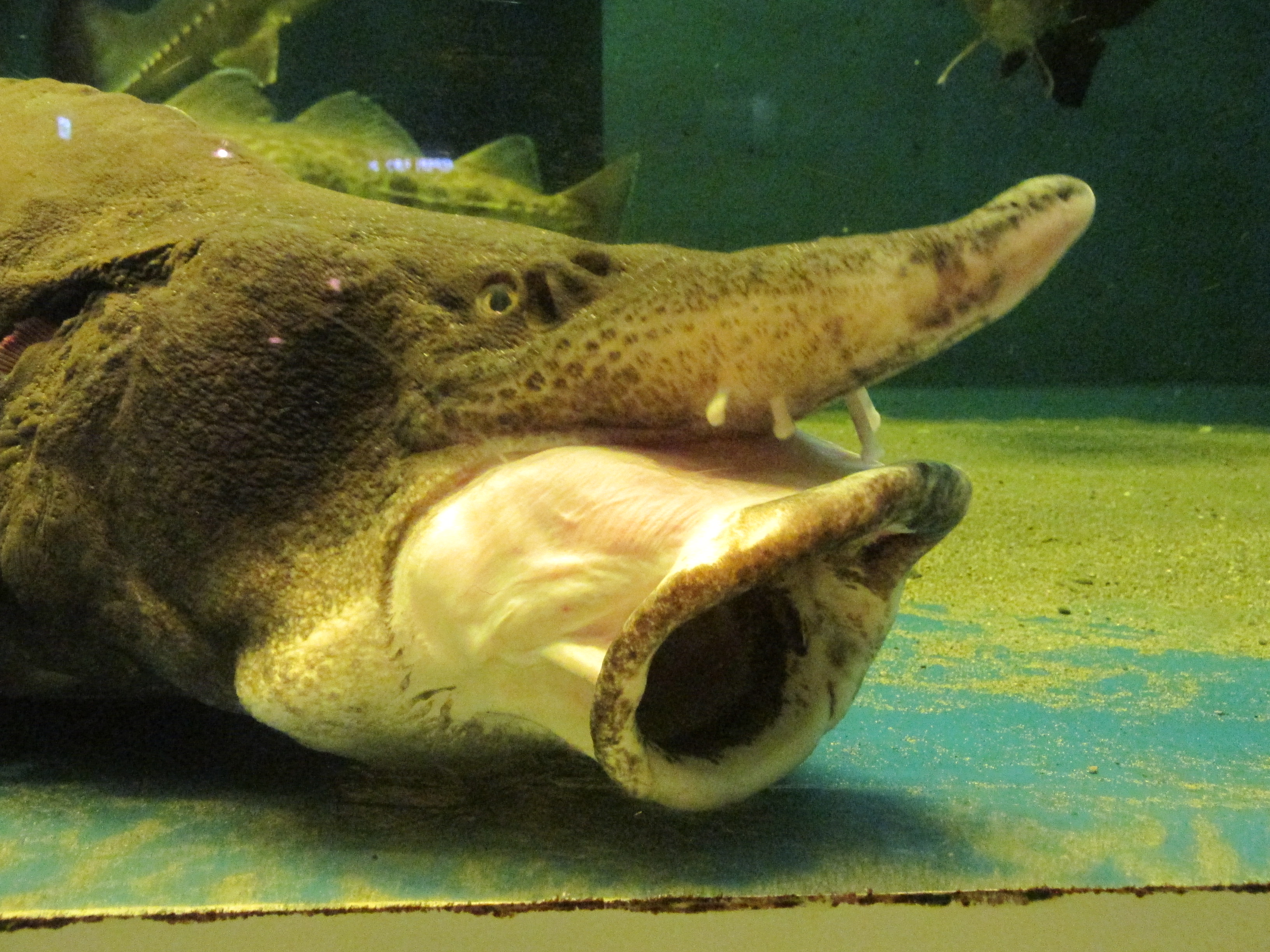 2017/06/25 浅虫水族館展示 ダウリアチョウザメ